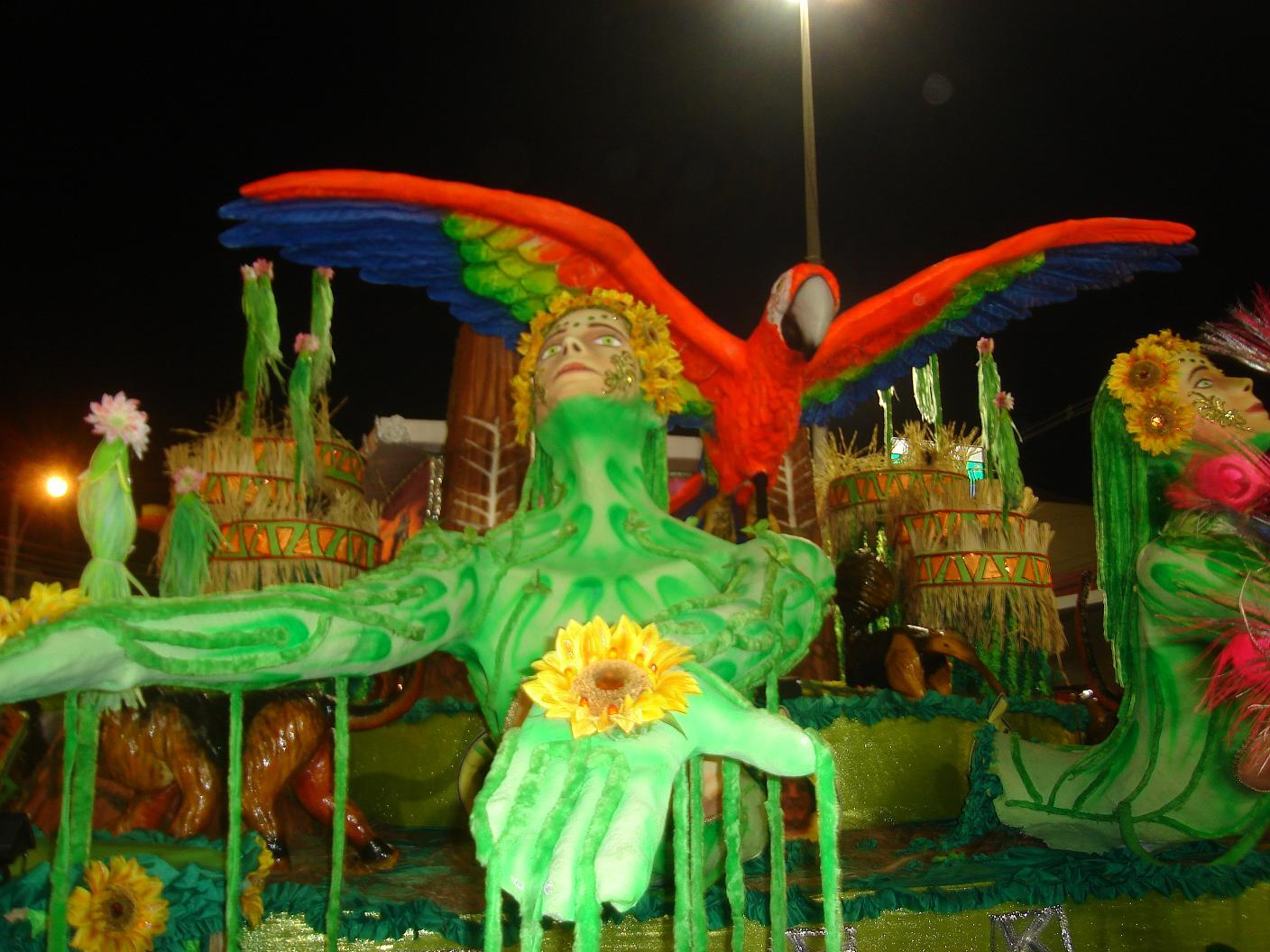 escola de samba Unidos de Vila Kennedy, 2010.